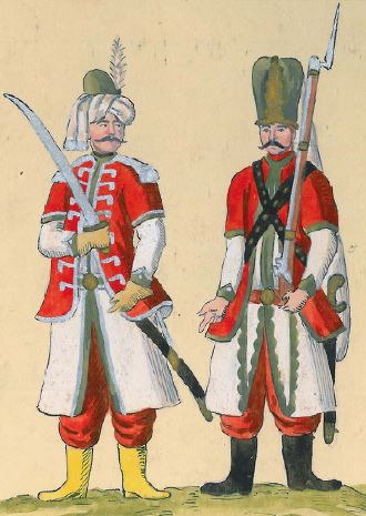 74. Chorągiew janczarska Buławy Polnej Koronnej [szeregowy chorągwi grenadierskiej (węgierskiej, janczarskiej) buławy polnej litewskiej]